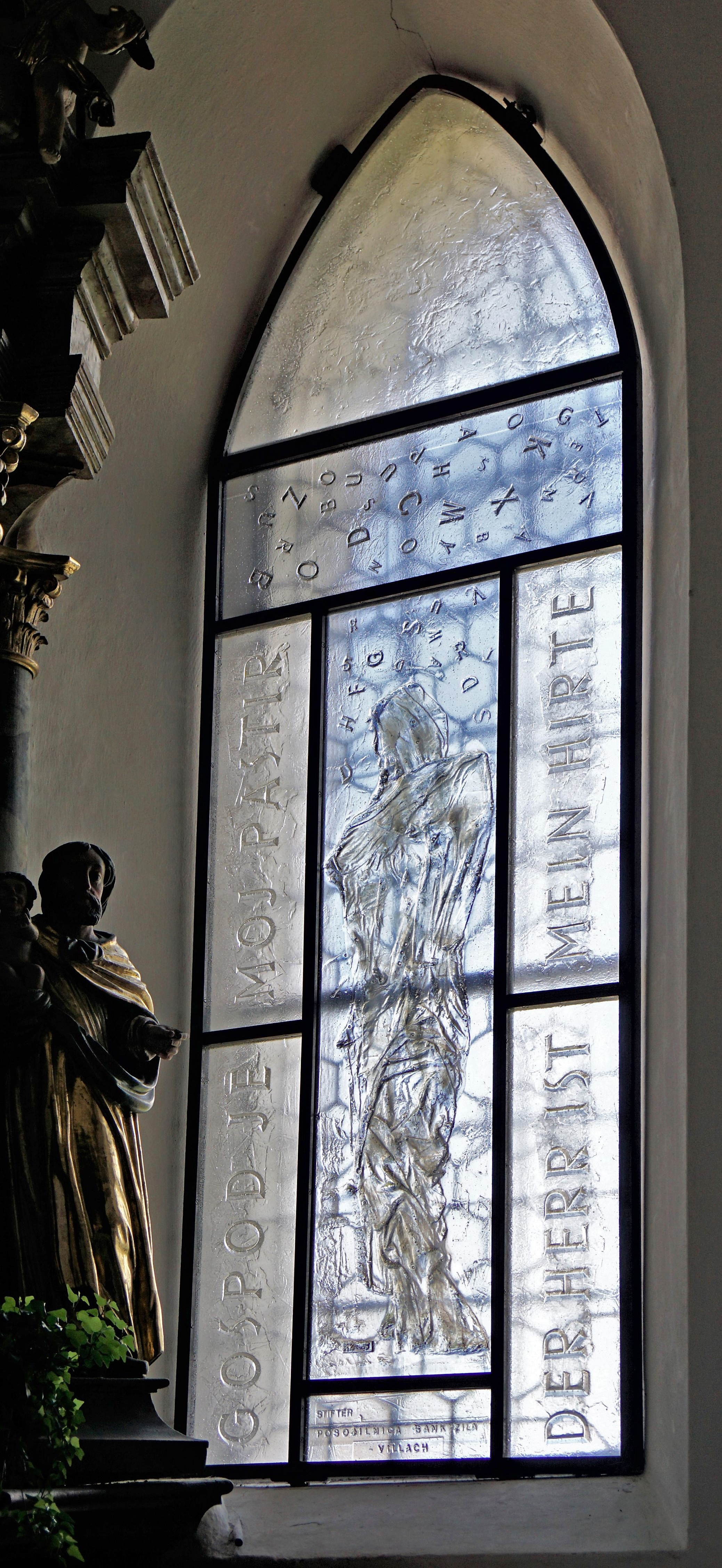 Kath. Pfarrkirche St. Stefan (Finkenstein), Glasfenster im Chor von Valentin Oman